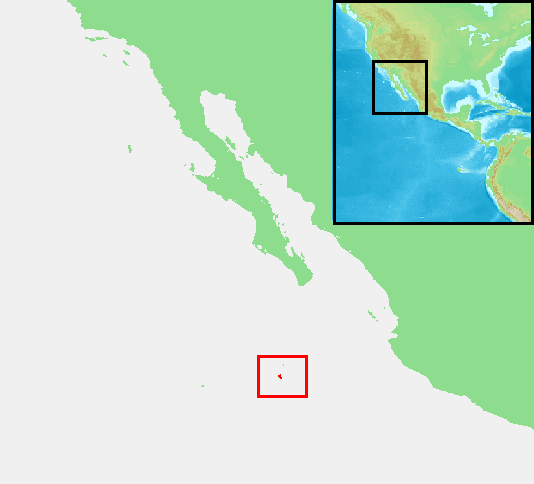 Revillagigedo Islands